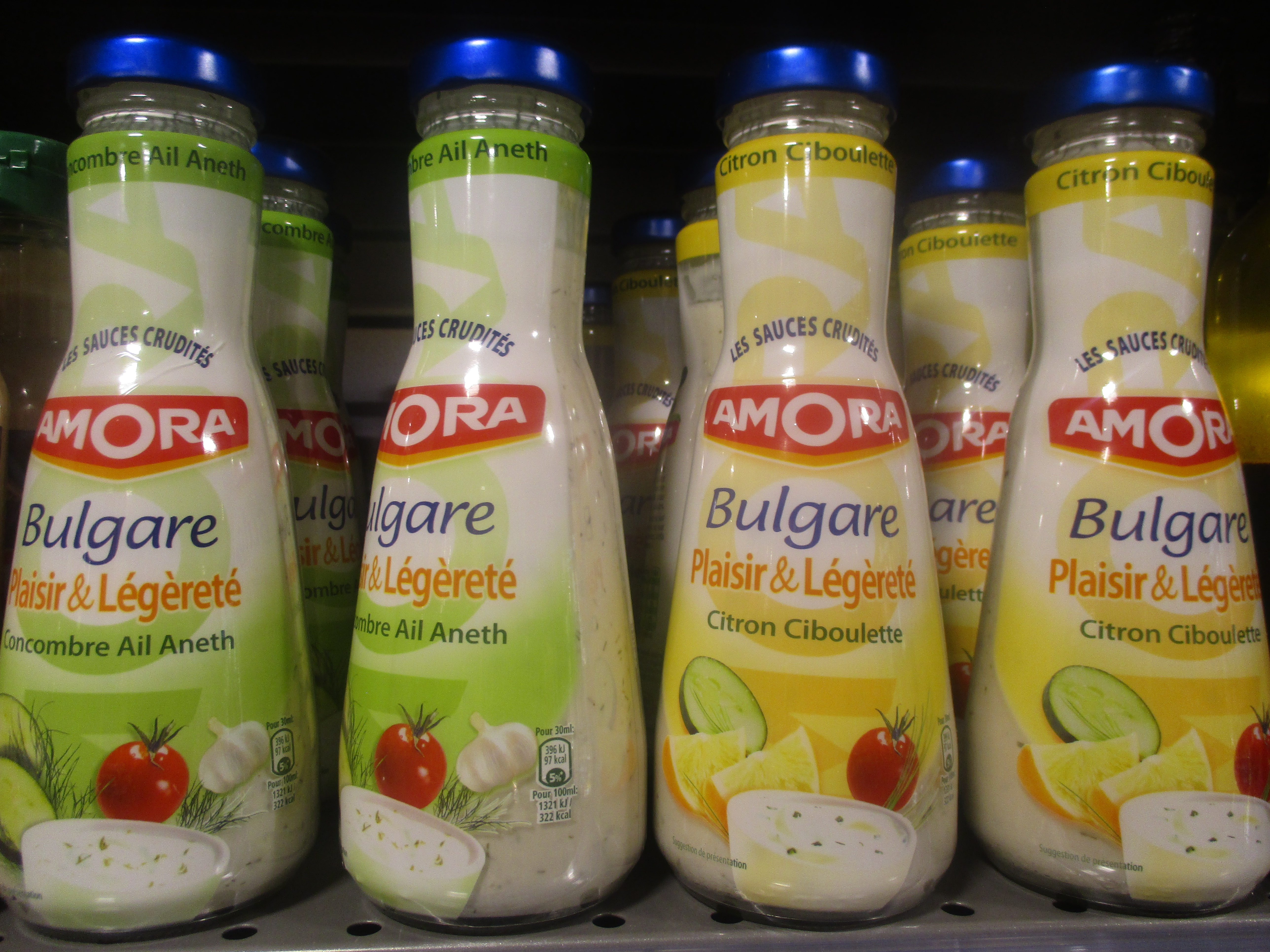 Amora différentes sauces "Bulgare".